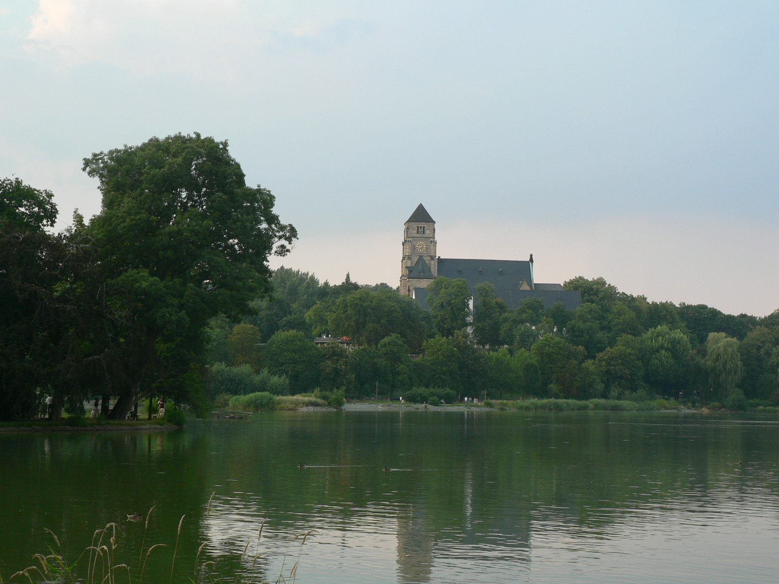 Dieses Bild Zeigt die Schloßkirche in Chemnitz, vom Ufer des unter ihr liegenden Schloßteich aus fotografiert.